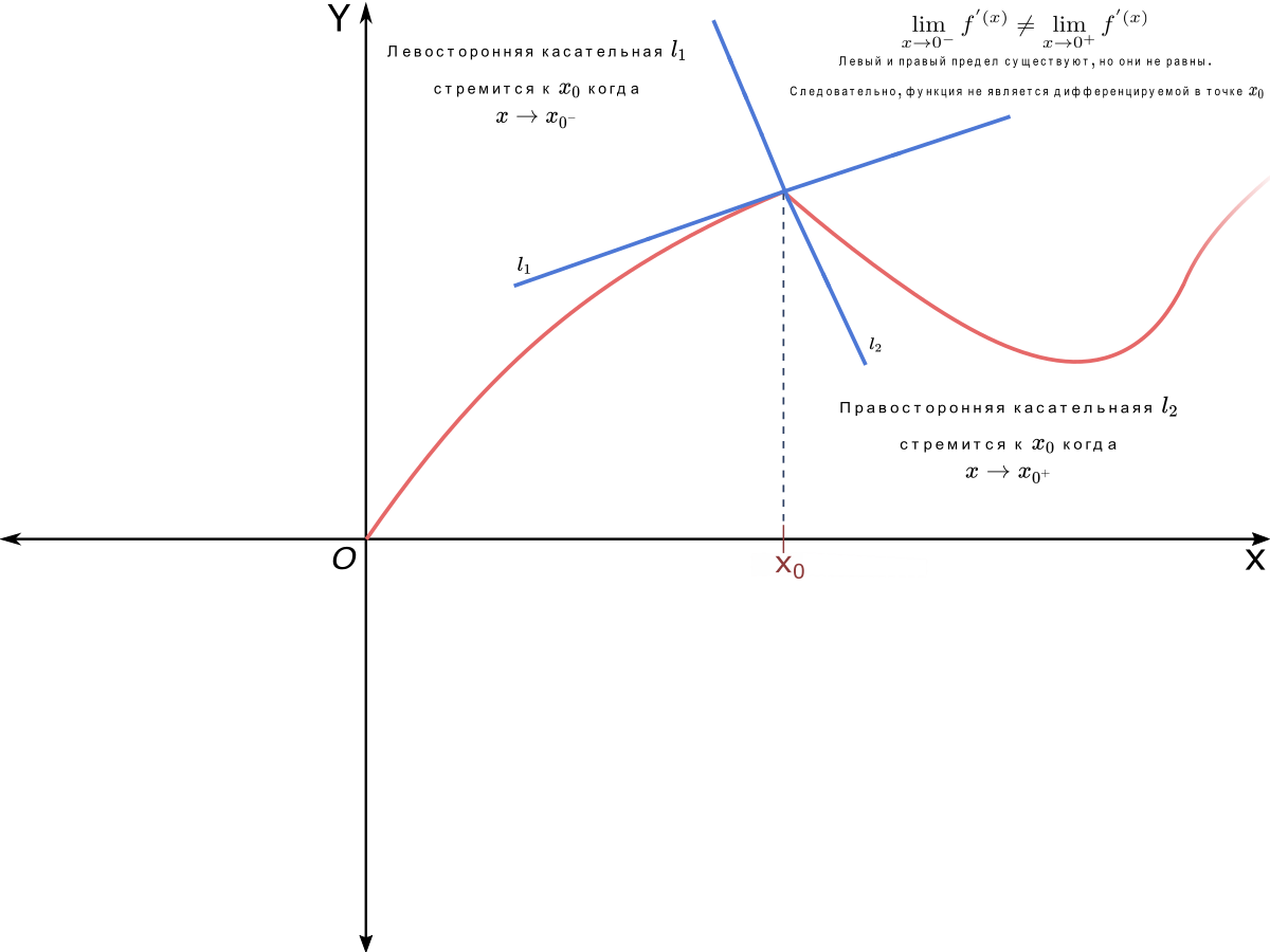 Точка недифференцируемостиТочка недифференцируемости